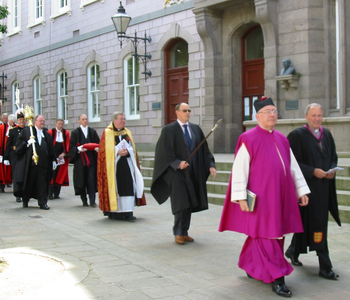 Nrf: Jour d'la Libéthâtion, Jèrri, 9 d'Mai 2009